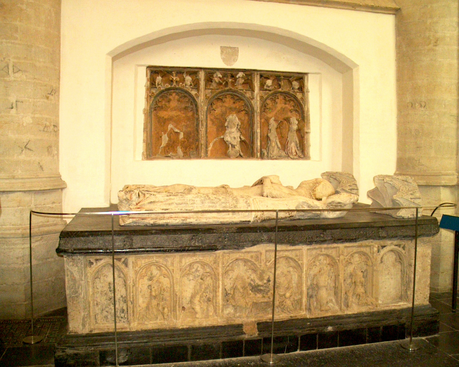 Grafmonument Grote Kerk Breda in Breda